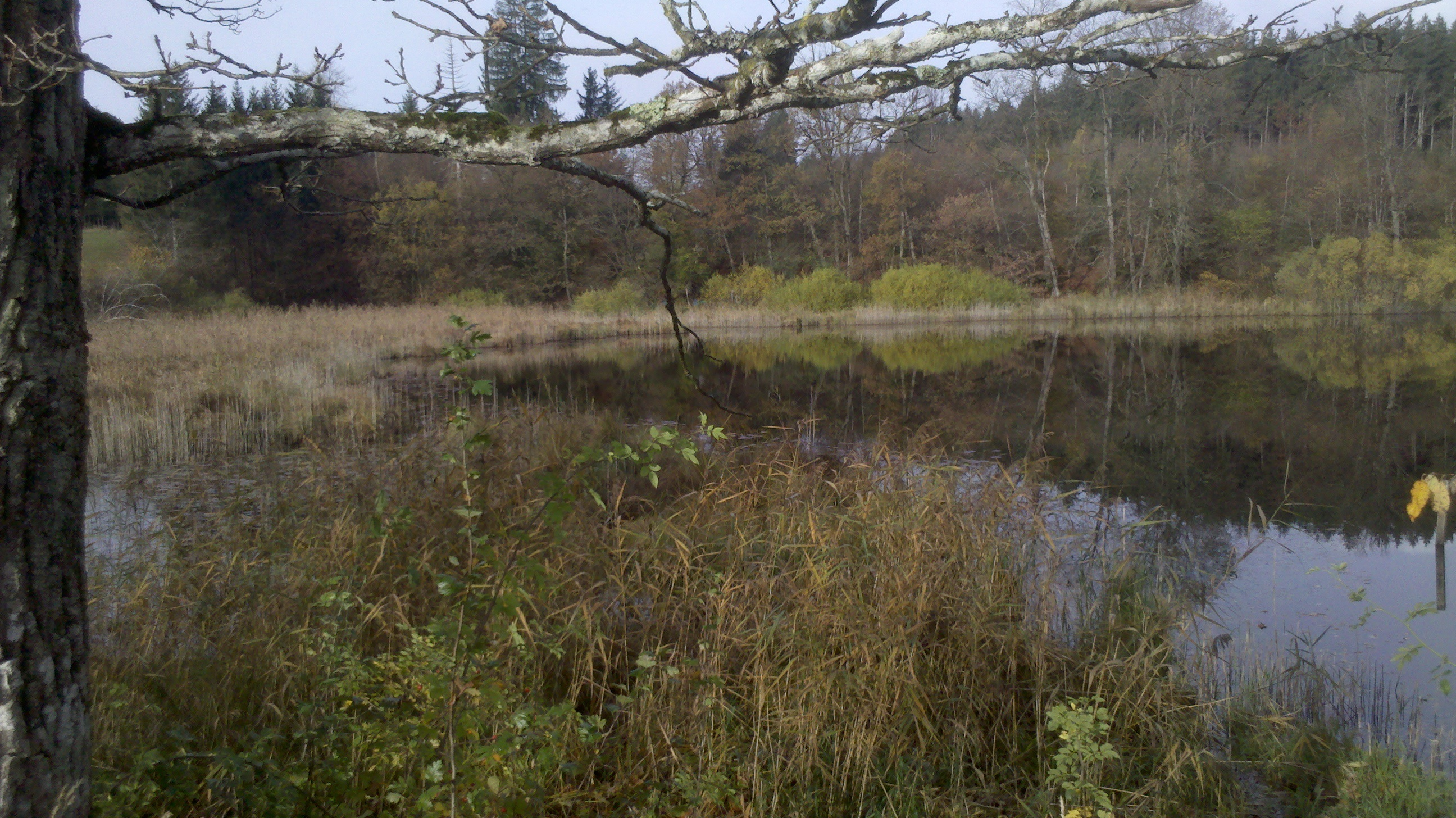 Buchsee November 2013